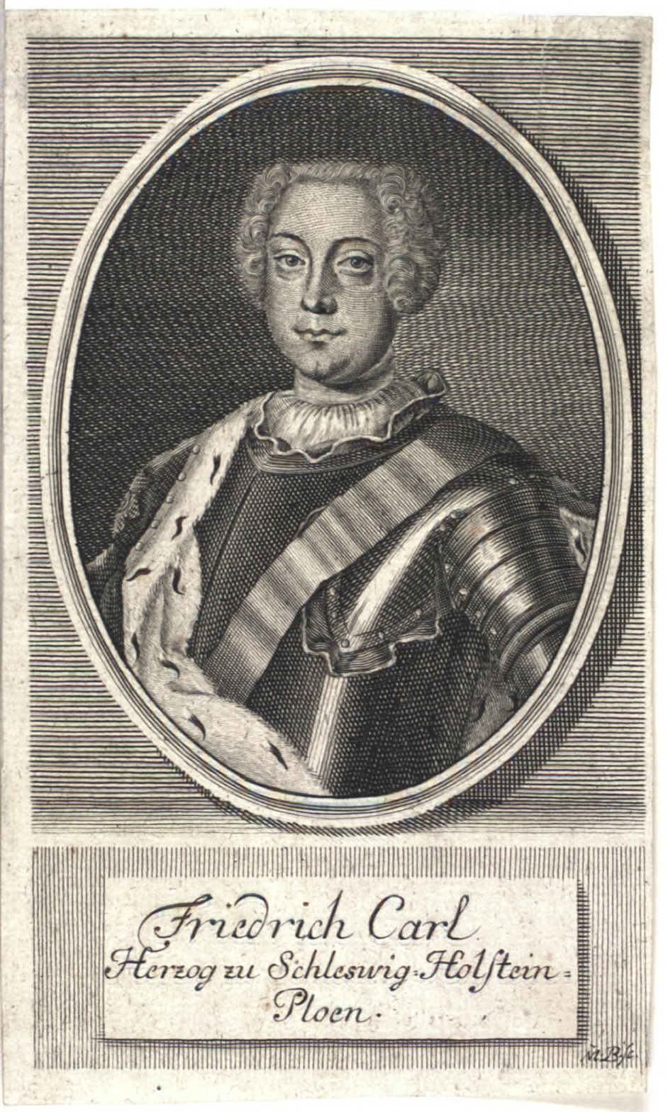 Frederik Carl (1706-1761) hertug af Slesvig-Holsten-Sønderborg-Pløn